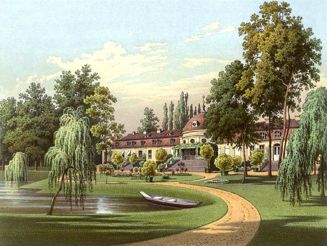 Schloss Gleissen, Kreis Sternberg